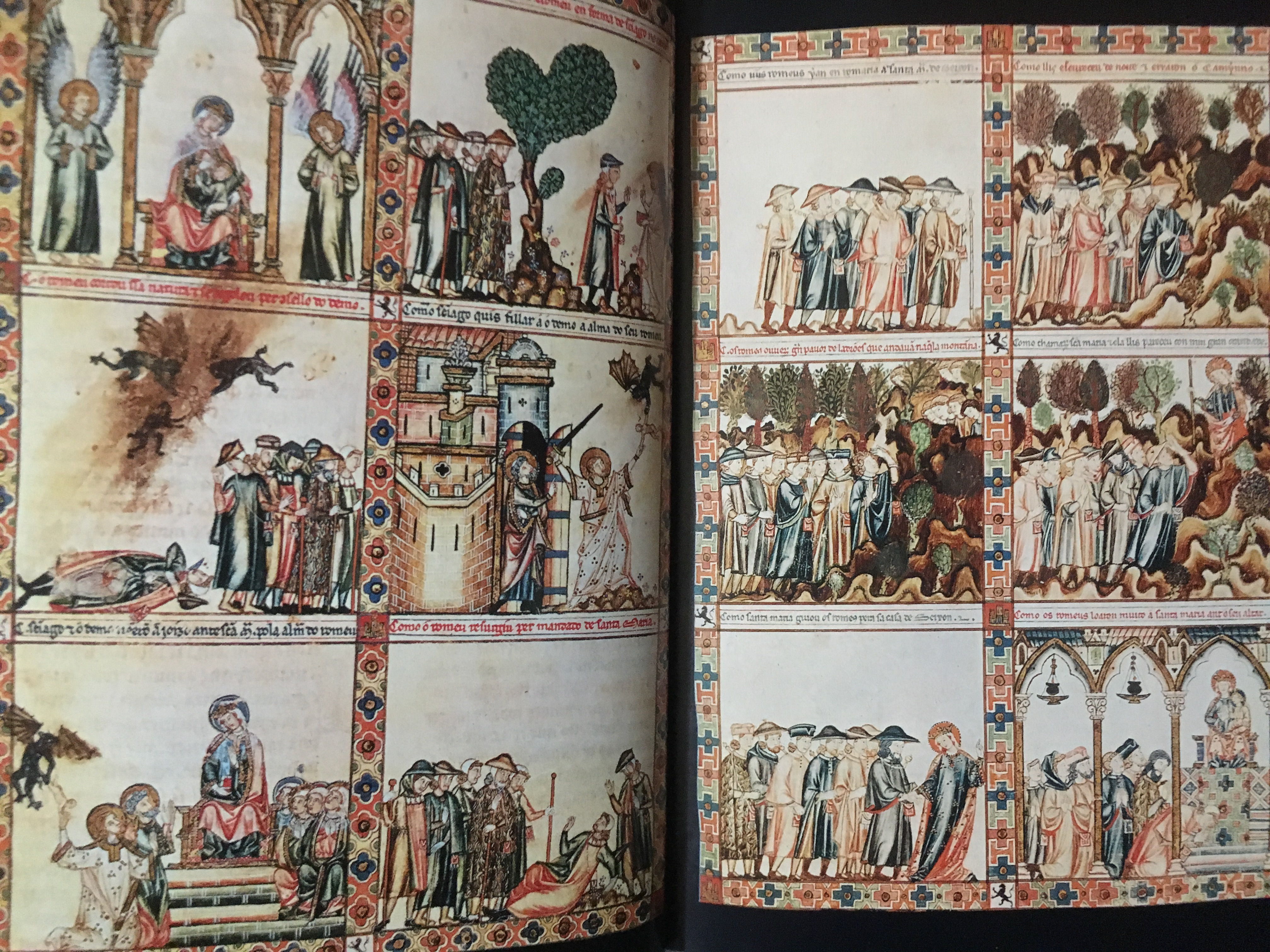 Miracles de saint Jacques, Cantigas de Santa Maria, manuscrits du XIIIᵉ siècle, cour d’Alphonse X. Bibliothèque royale du monastère de l’Escurial, Madrid. — Ouverture de Compostelle, le grand chemin de Xavier Barral i Altet, collection « Découvertes Gallimard / Religions » (n° 174), description à la page 168. Éditions Gallimard, 13 mai 1993.